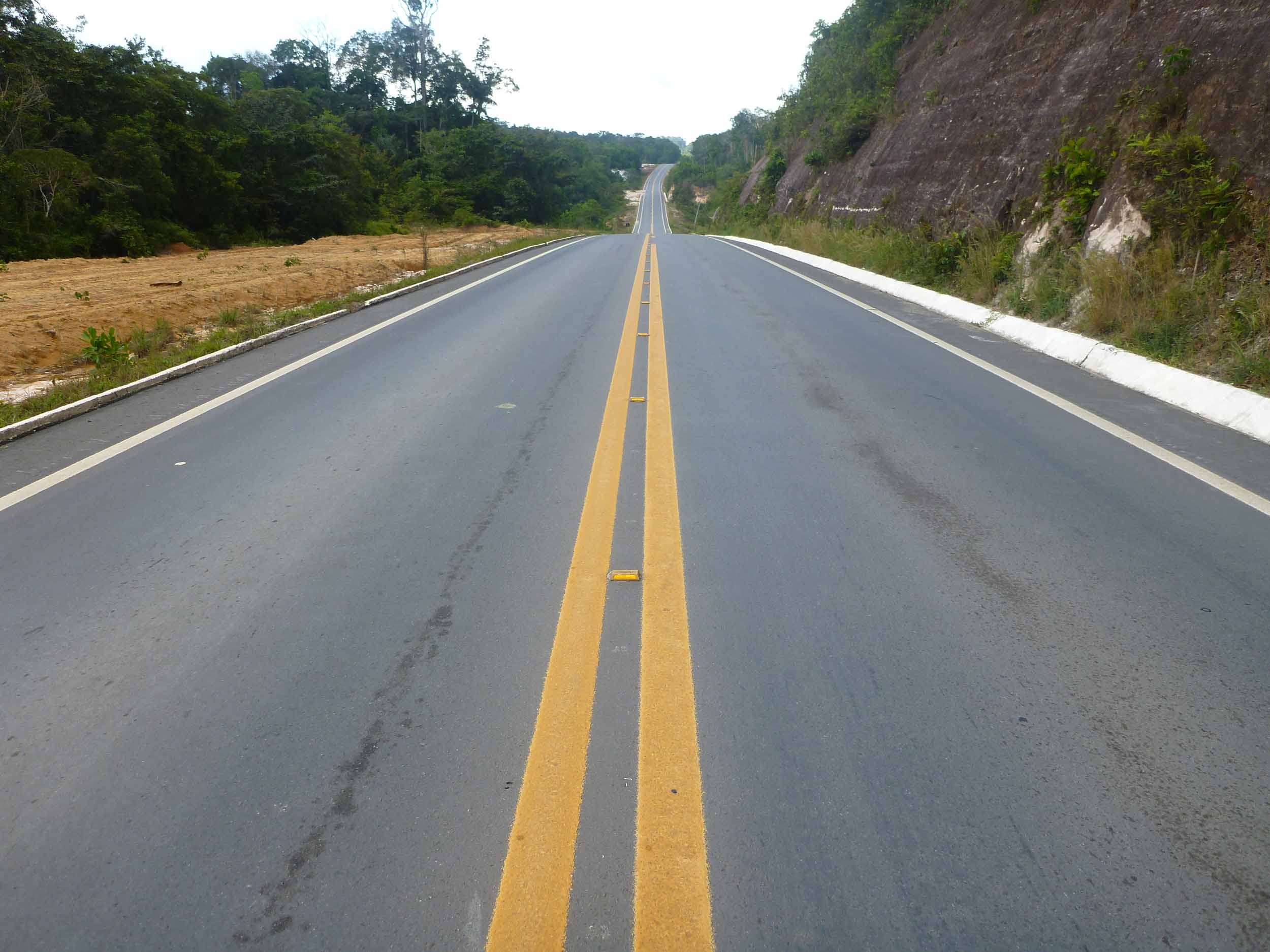 Pesquisa CNT de Rodovias 2012 - Foto: Arquivo/CNT